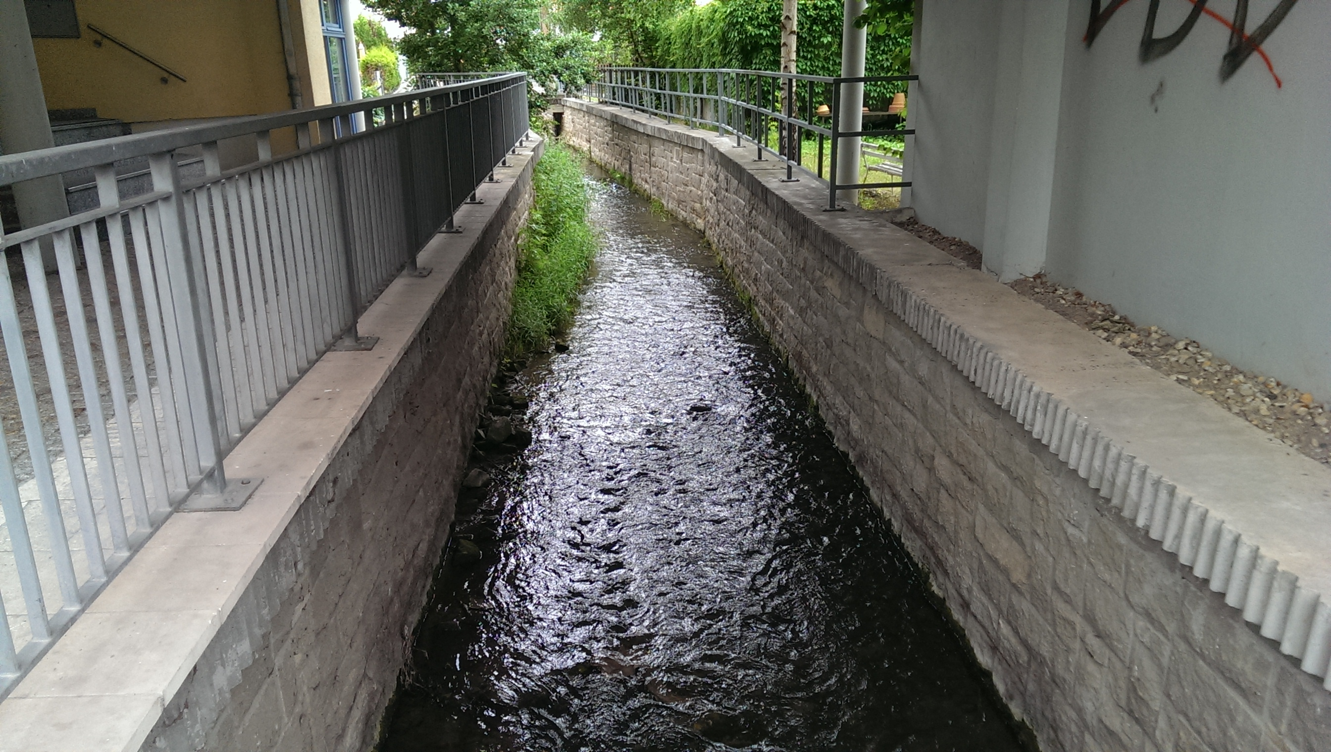 Die wieder eröffnete Bebra in Sondershausen, Bebrastraße.